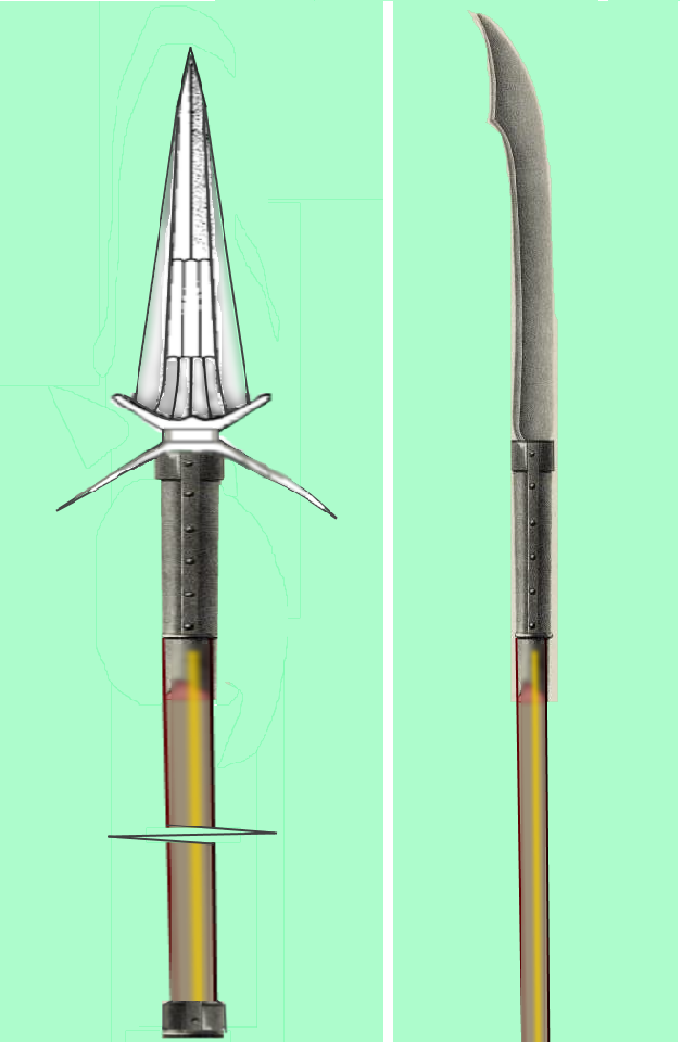 Західноєвропейський "волячий язик" у порівнянні зі східноєвропейською совнею. Компіляція на основі акварельних малюнків користувача Usik64 (ВоловЯзик 01.png і Совна 01.png).